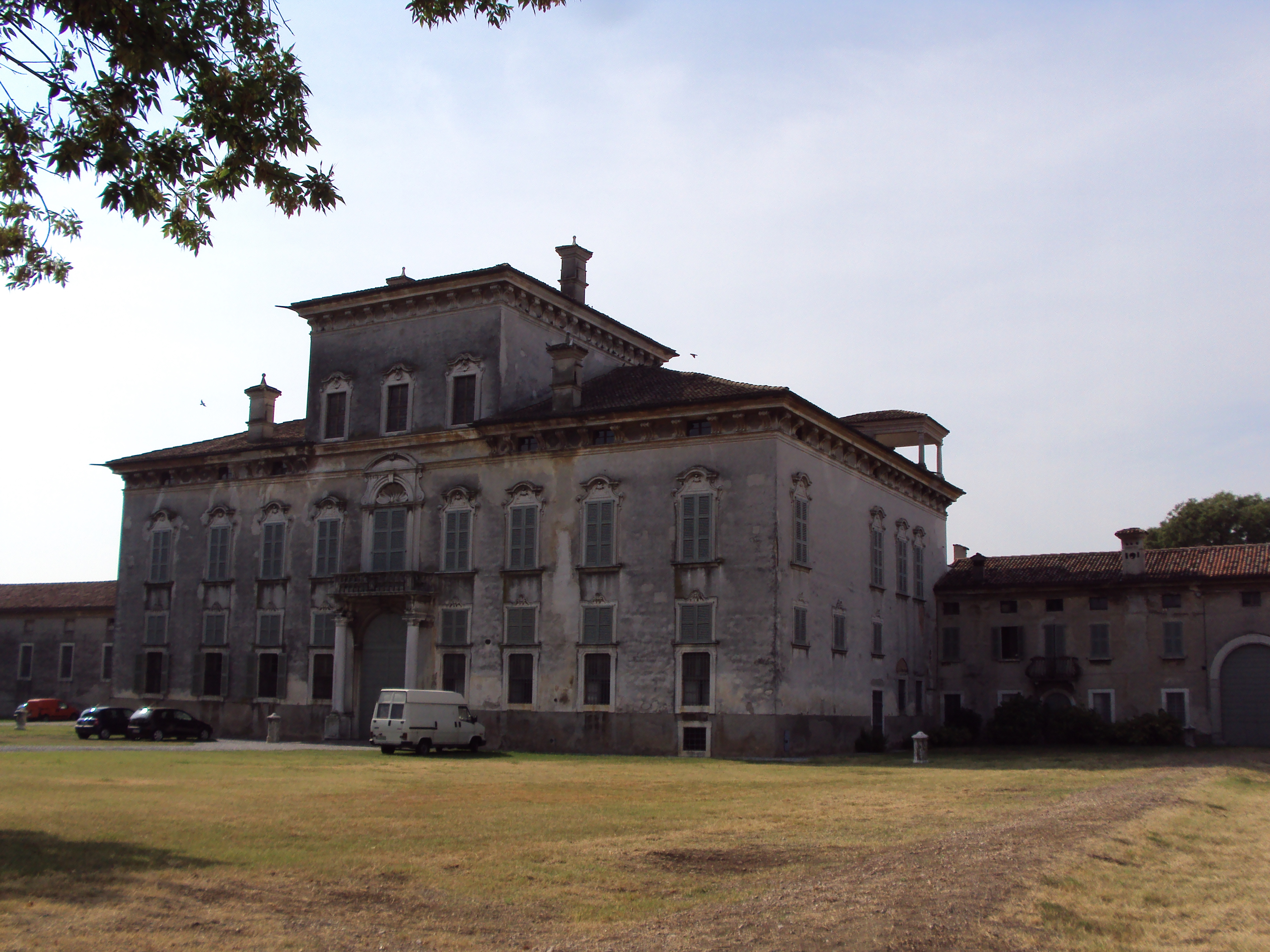 Veduta frontale del Palazzo Lechi